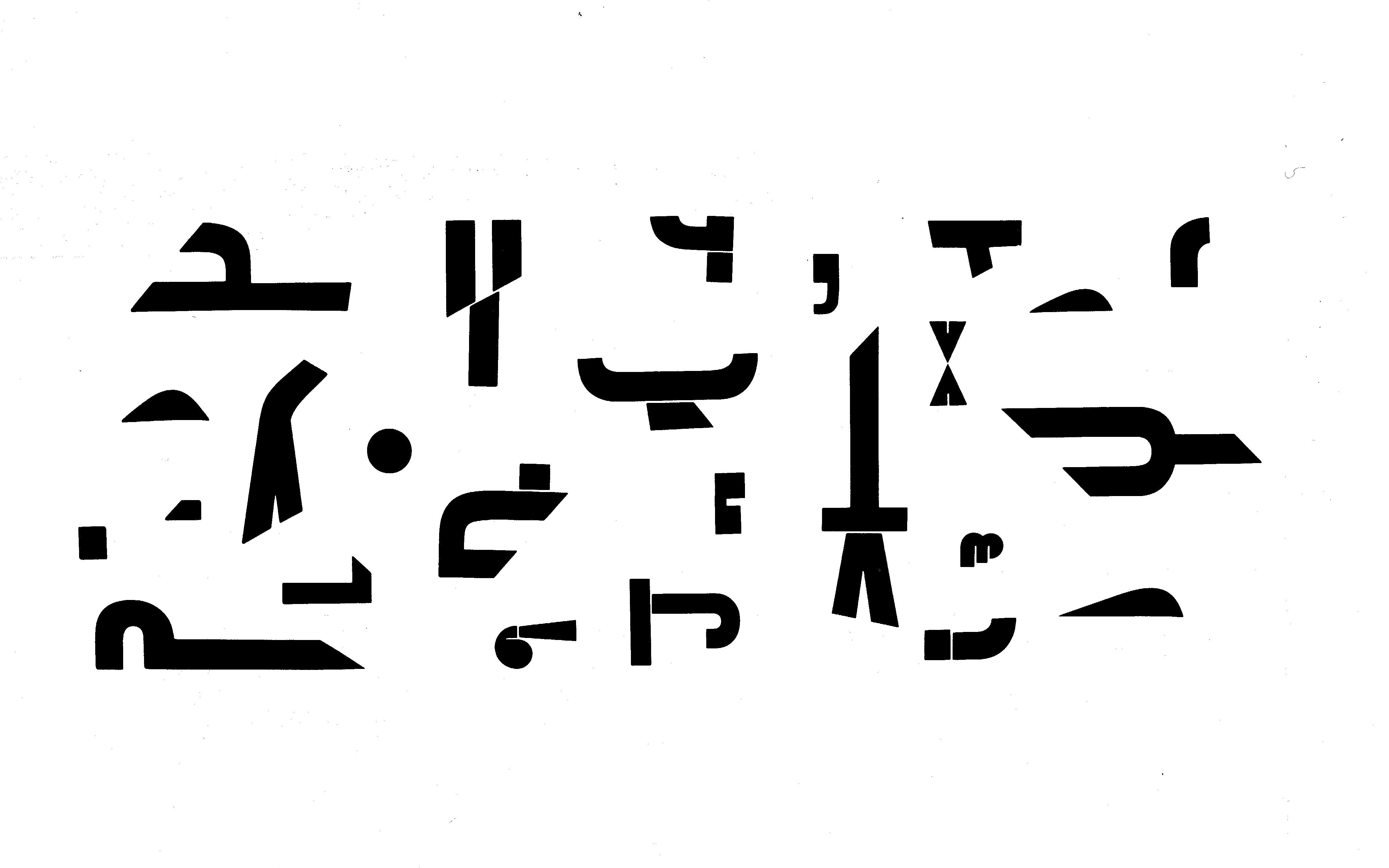 Tecnica: Letraset su cartone; cm 75 x 53